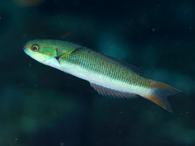 コガシラベラ Thalassoma amblycephalum